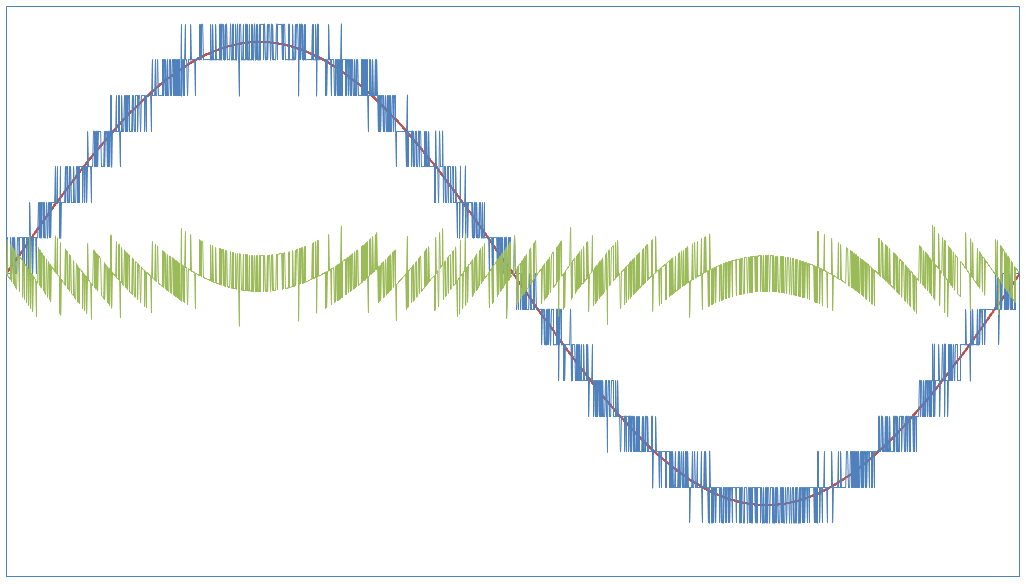 Señal cuantificada a 4 bits con dither (SNR total: 19,27). La señal cuantificada es la de la imagen Senal4bitsDitherAnalogica1.png. Se muestra ruido de cuantificación+dither en verde y sinusoidal original en rojo.